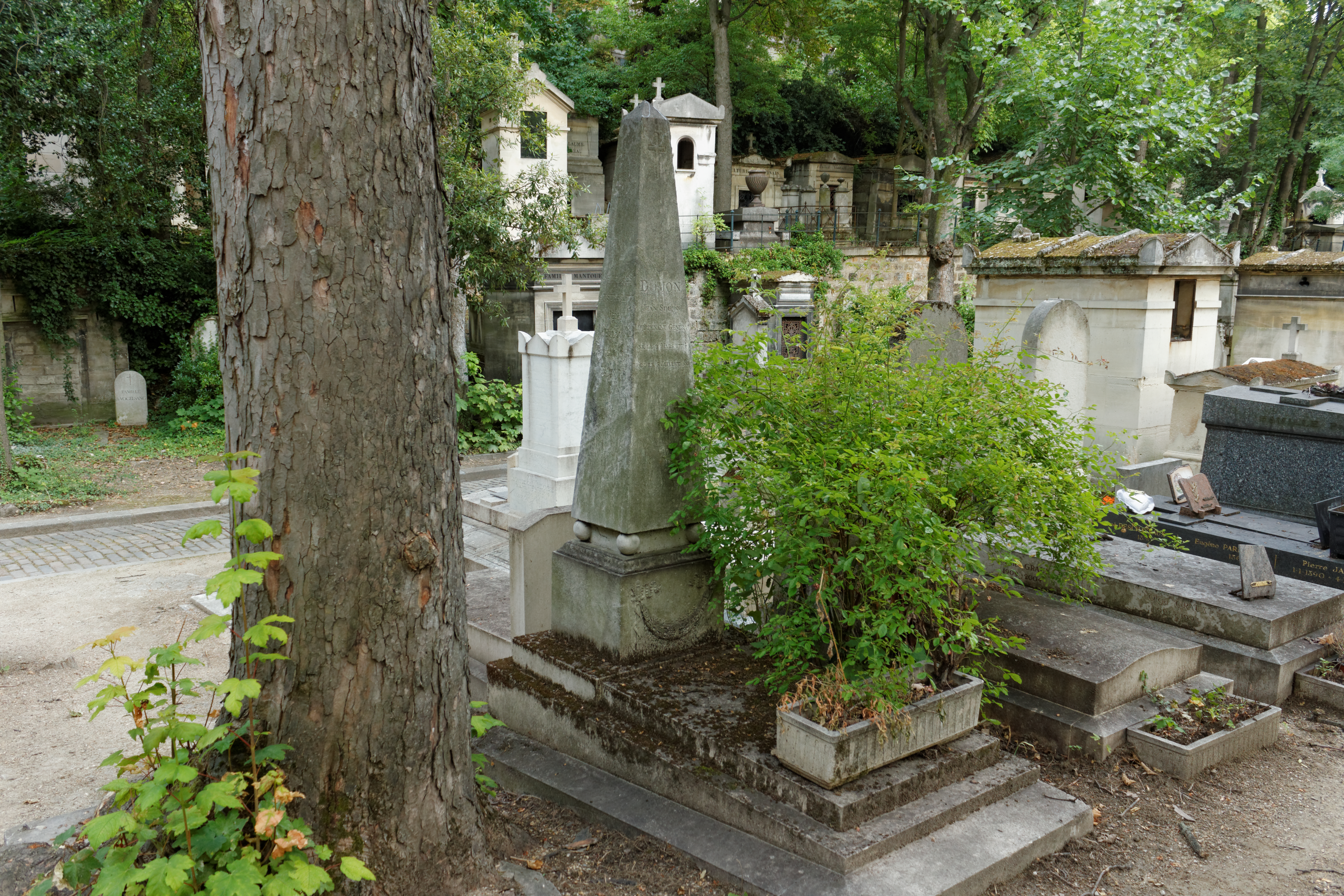 Sépulture de Jean-Siméon Domon (1774-1830), général de division.